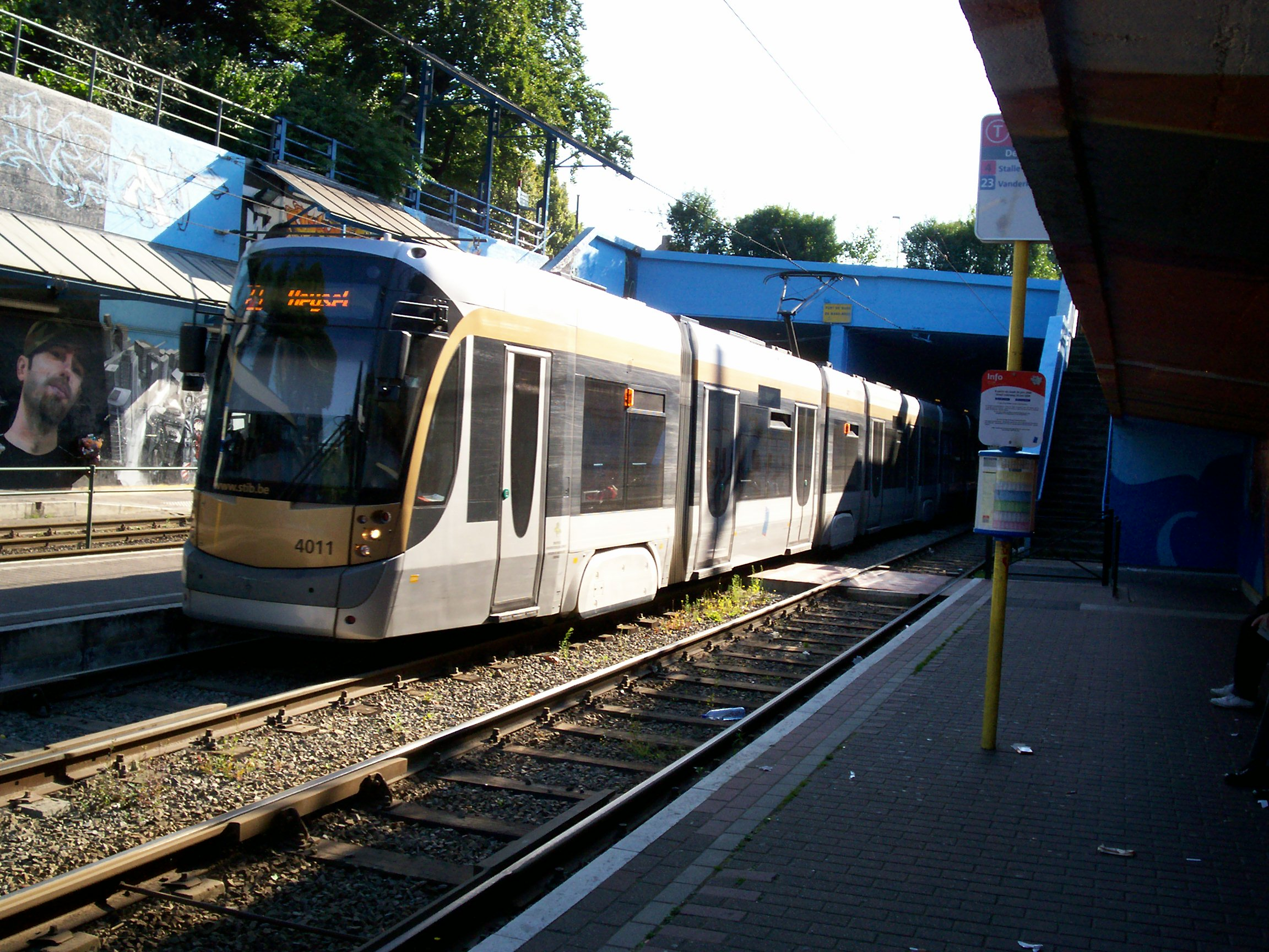 T 4000 de la ligne 23 arrivant à De Wand à destination du Heysel